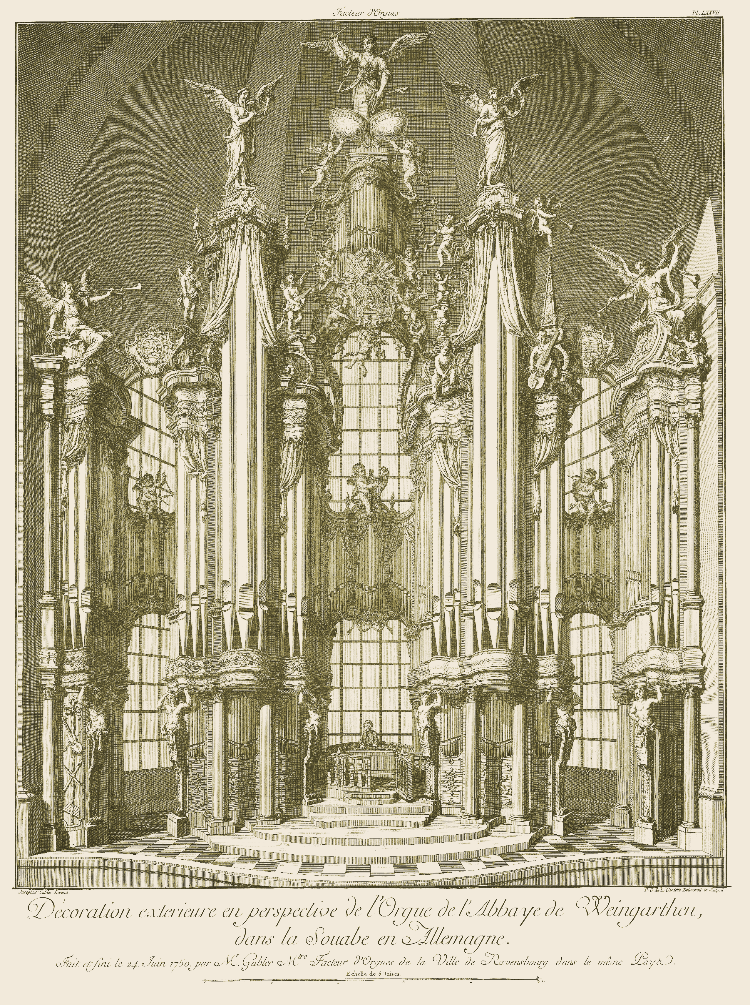 Planche 77, Figure 1 du traité « L'Art du facteur d'Orgues » par Dom François Bedos de Celle